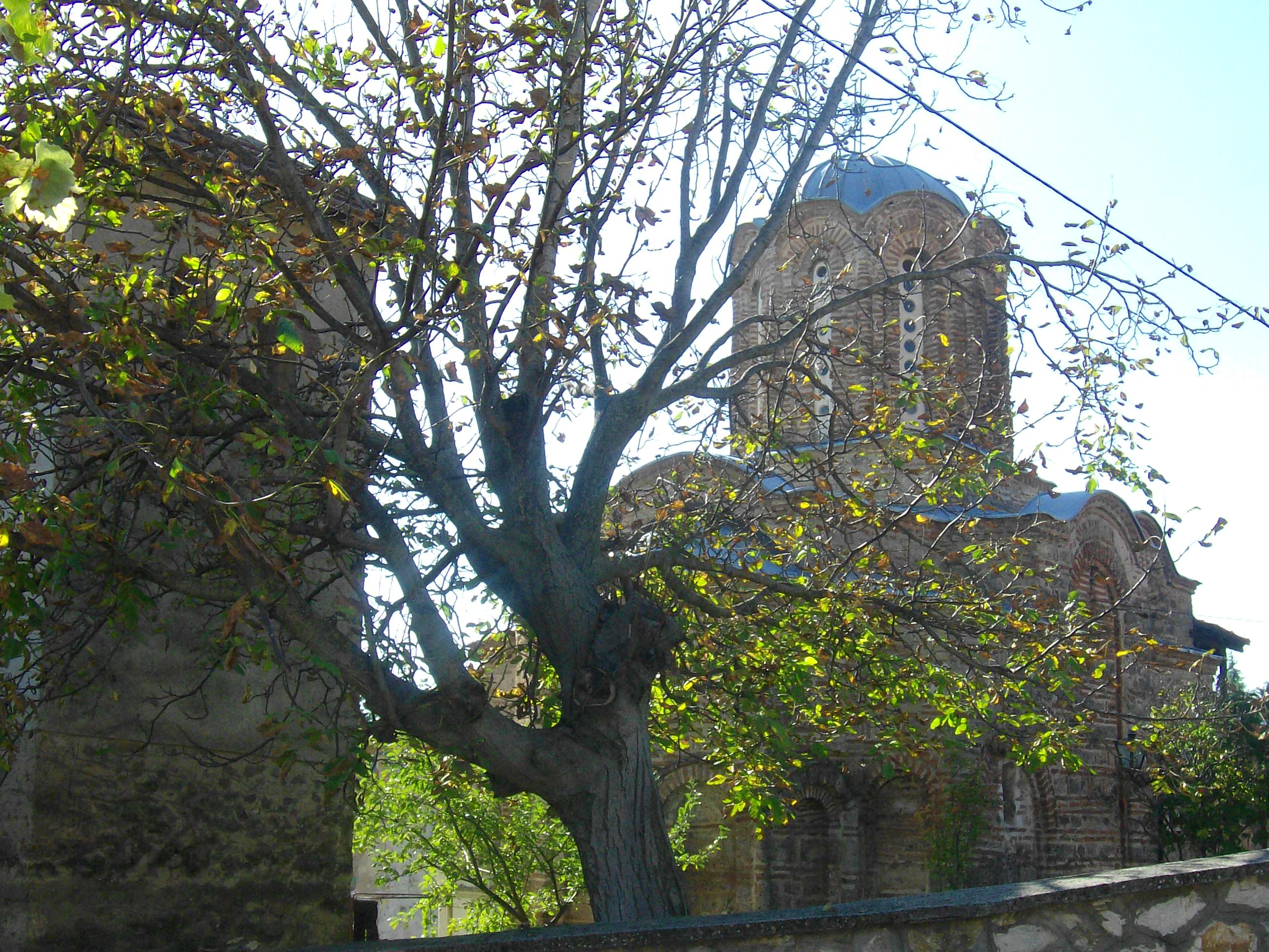 Crkva Sv.Spas- Kuceviste- Skopsko